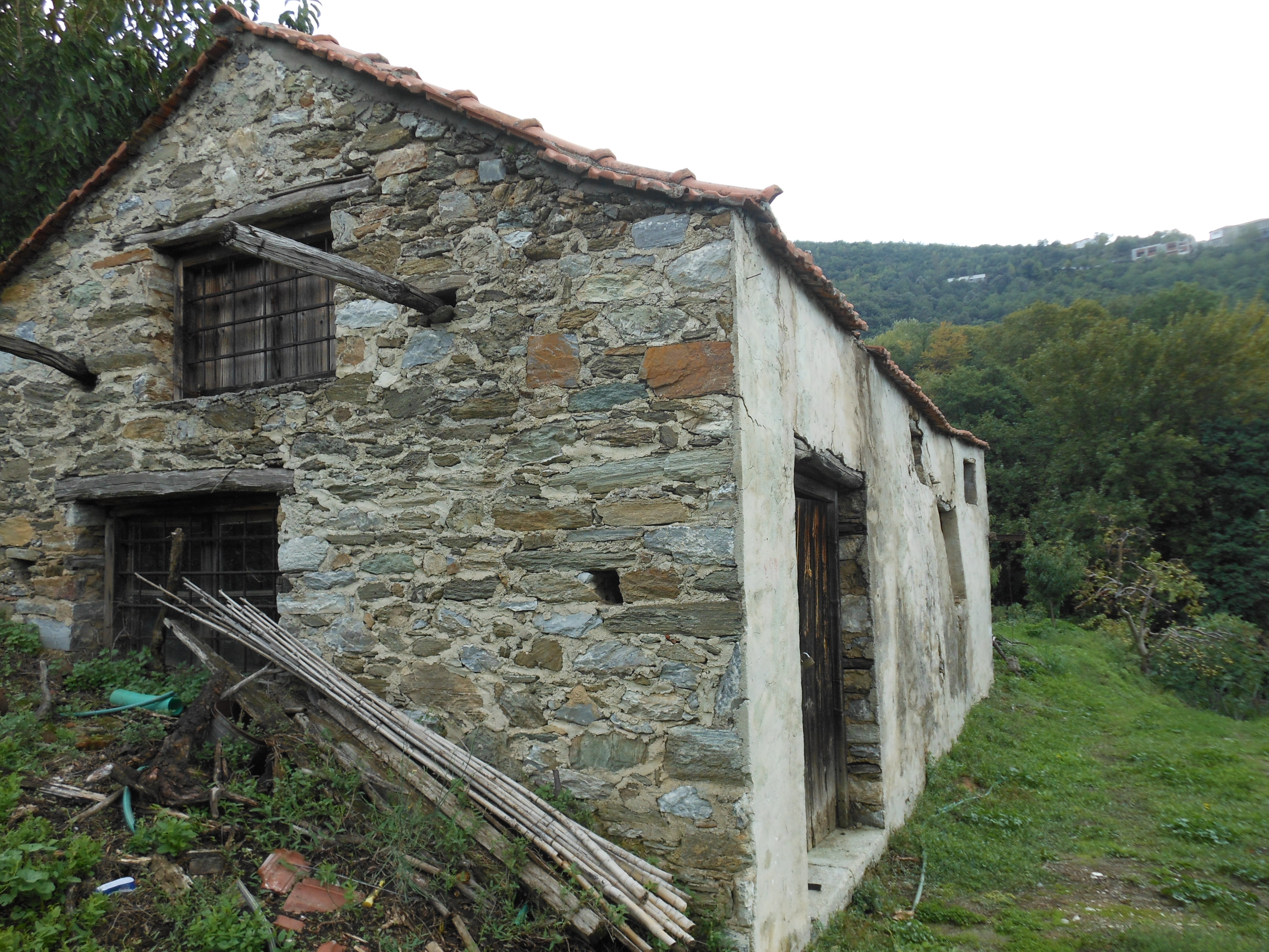 בית האריזה של משפחת ווליוטיס בכפר לחוניה שבהרי הפיליון, שם שוכנו והסתתרו בני משפחת חכים במהלך הכיבוש הנאצי וההסתרה